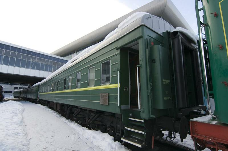 Вагон-салон № 70006 в експозиції Київської виставки рухомого складу історичних локомотивів та вагонів